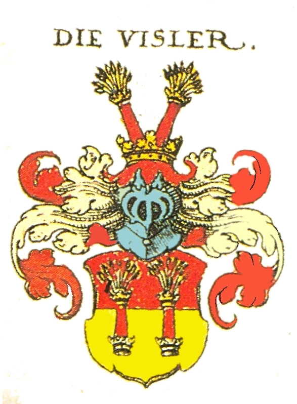 Wappen der Adelsgeschlecht die Visler (Siebmacher 1605:94,8)